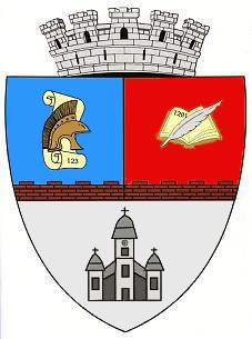 Stema Municipiului Gherla